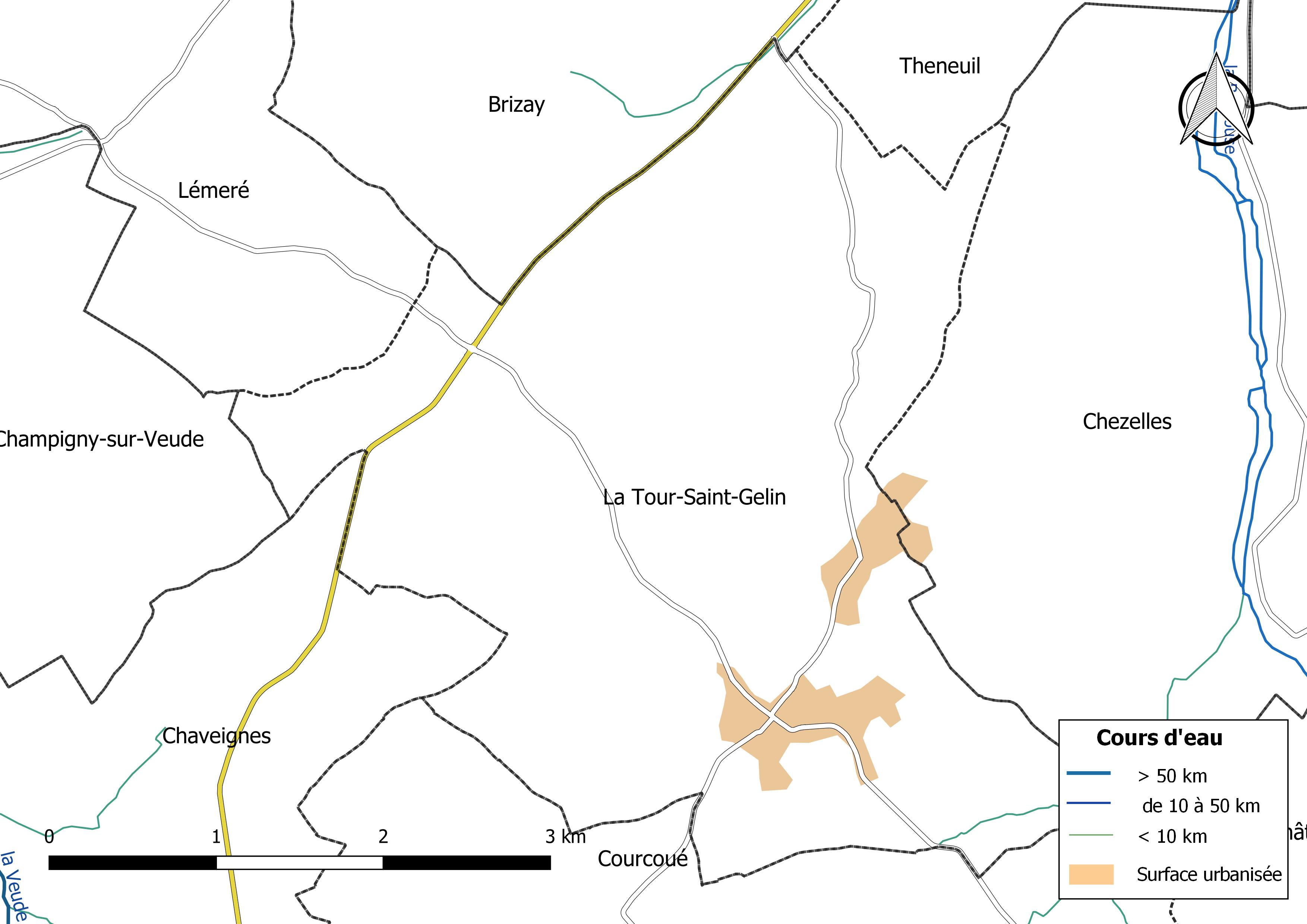 Carte du réseau hydrographique de la commune de La Tour-Saint-Gelin (France).